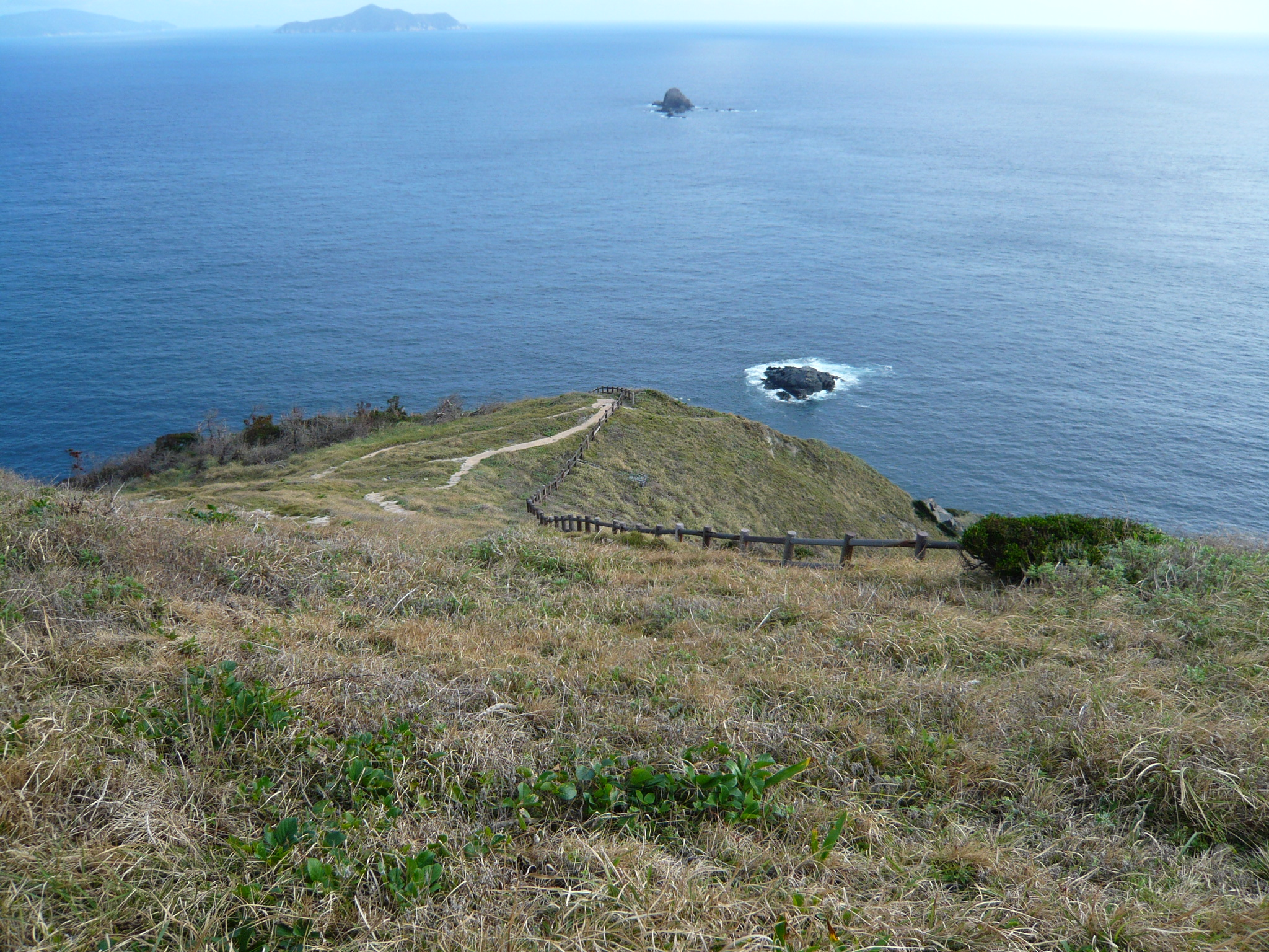 高茂岬（愛南町西海地区）